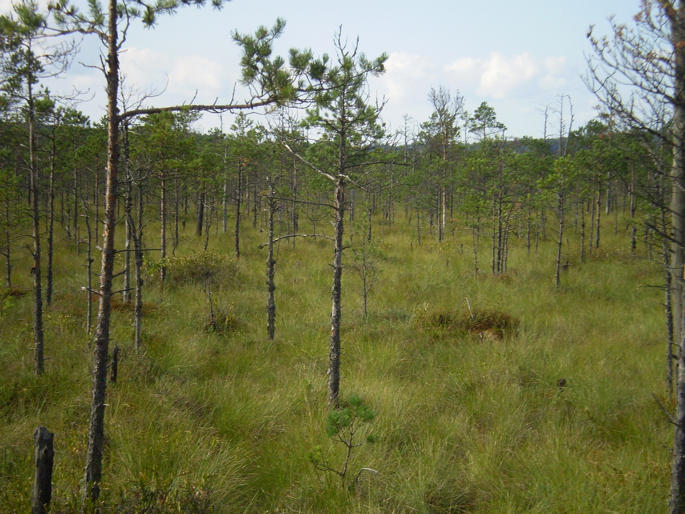 Домжарыцкае балота ў Бярэзінскім біясферным запаведніку